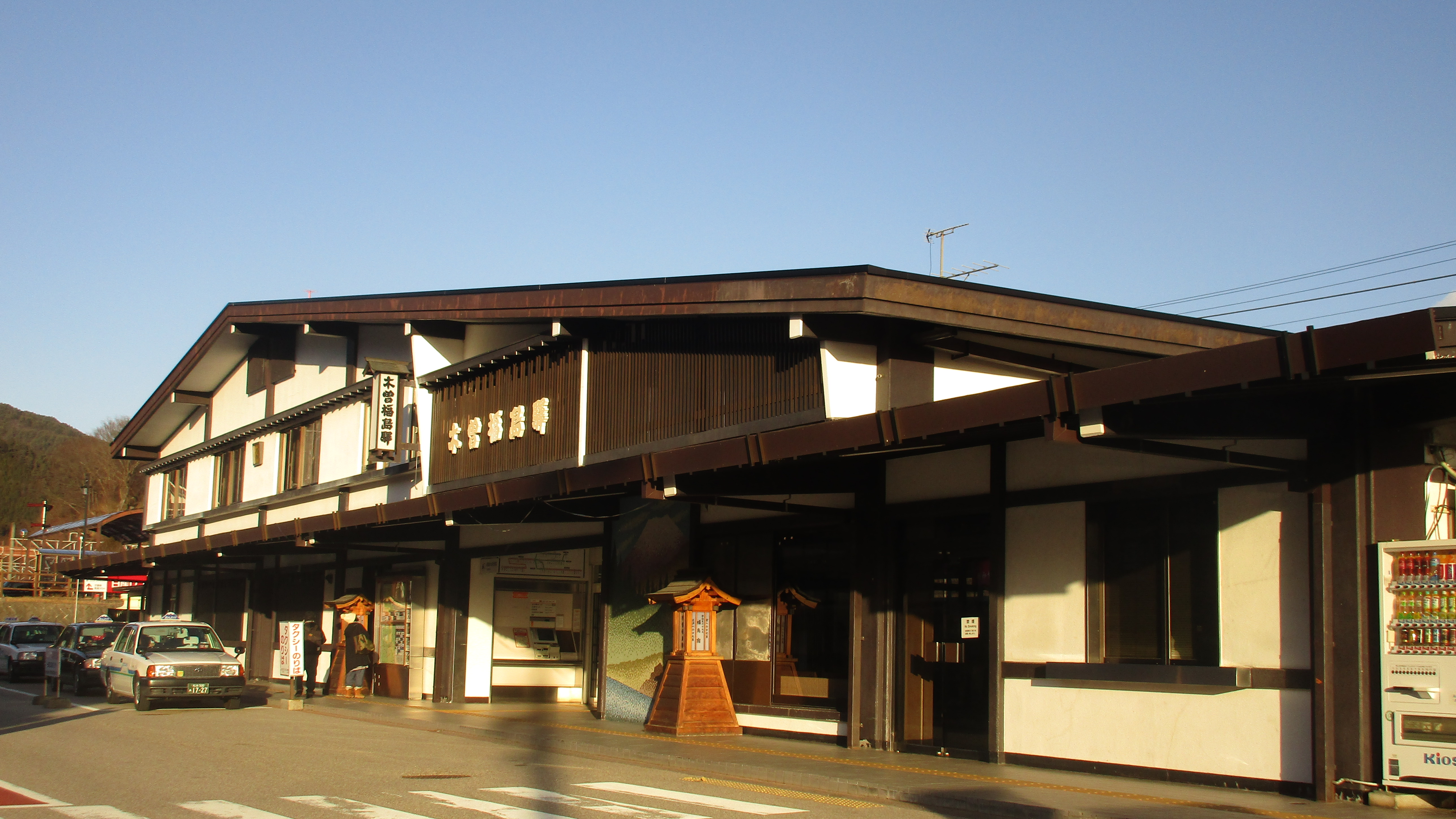 JR中央本線 木曽福島駅舎